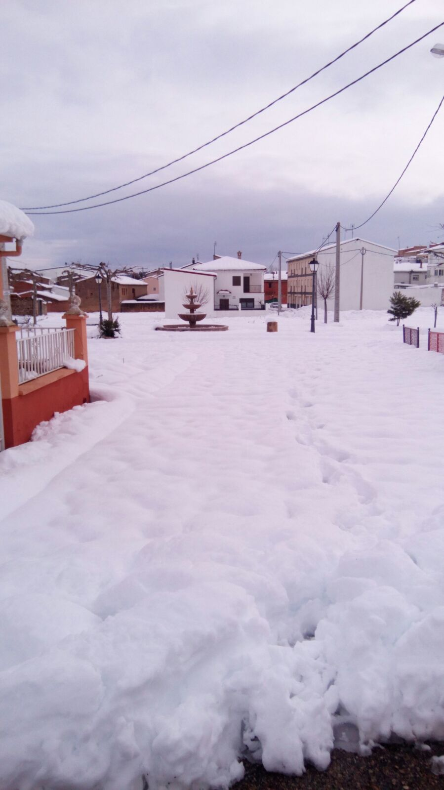 Aliaguilla tras la nevada del 19/01/2017